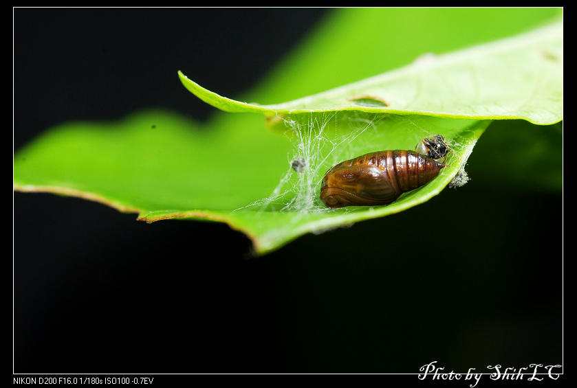 Monobolodes prunaria (Moore, 1887) 褐寬帶雙尾蛾